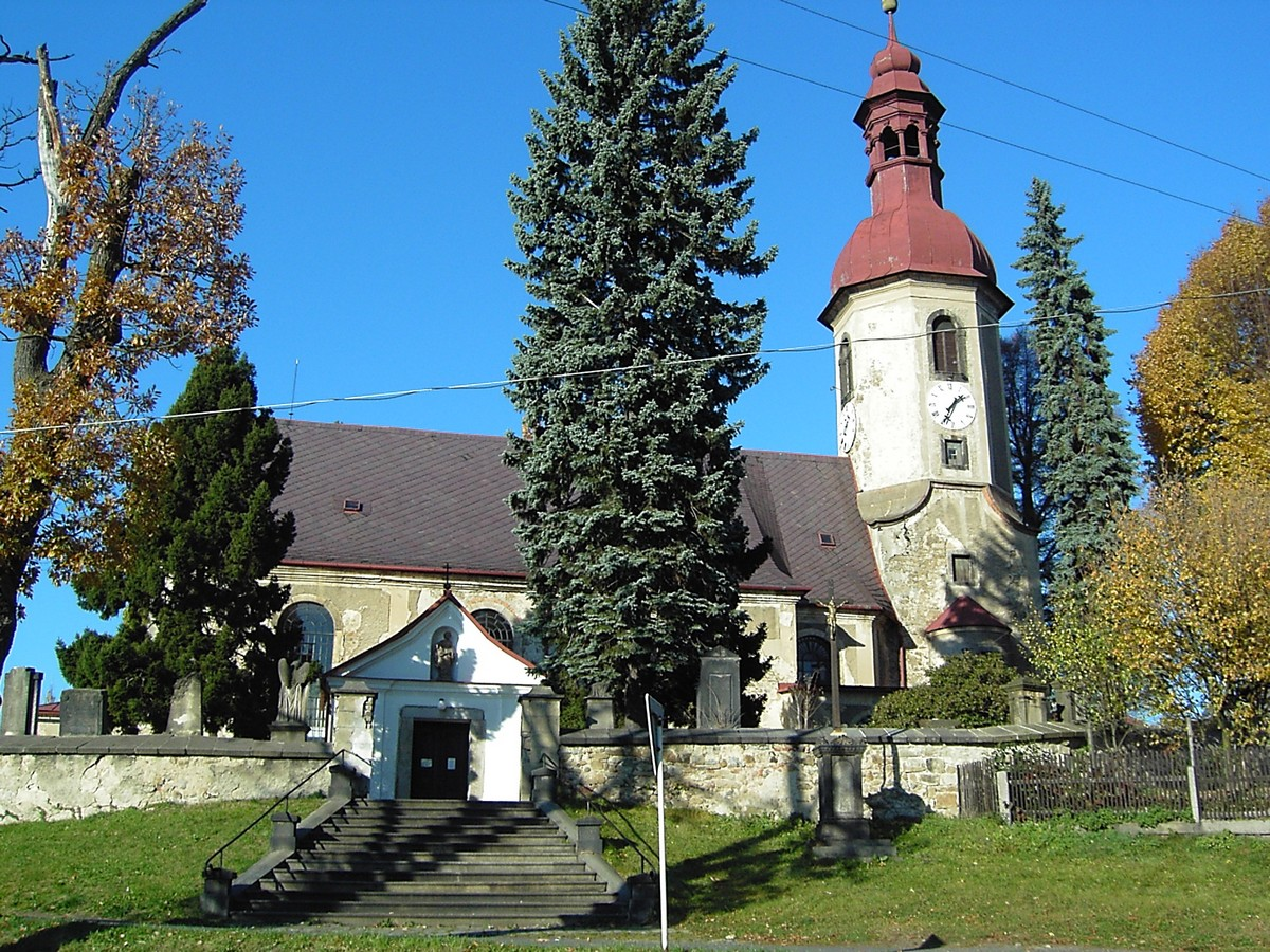 Kostel sv. Bartoloměje ve Velkém Šenově před rekonstrukcí